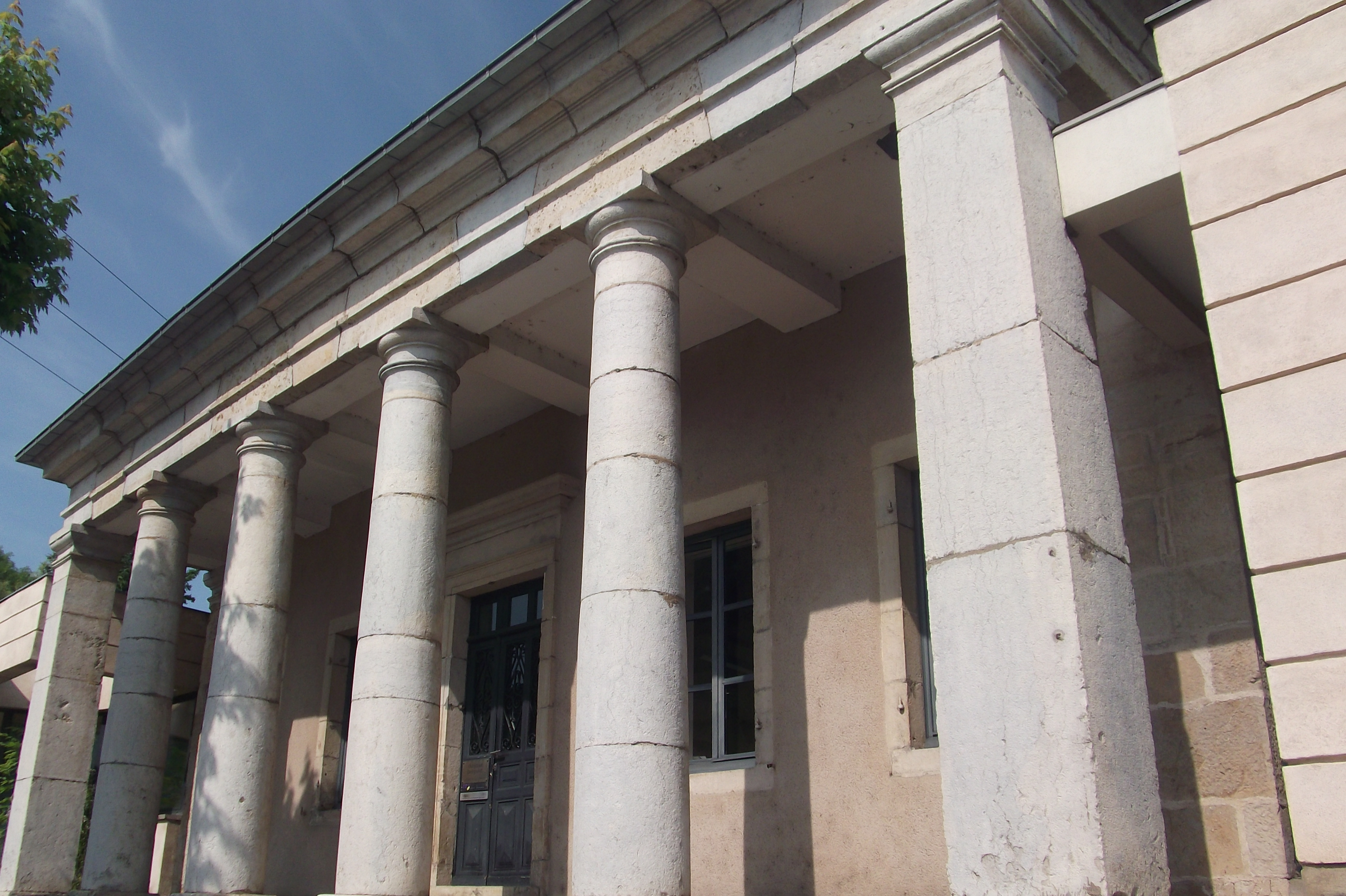 Un ancien bureau d'octroi de Vesoul (Haute-Saône, Franche-Comté)